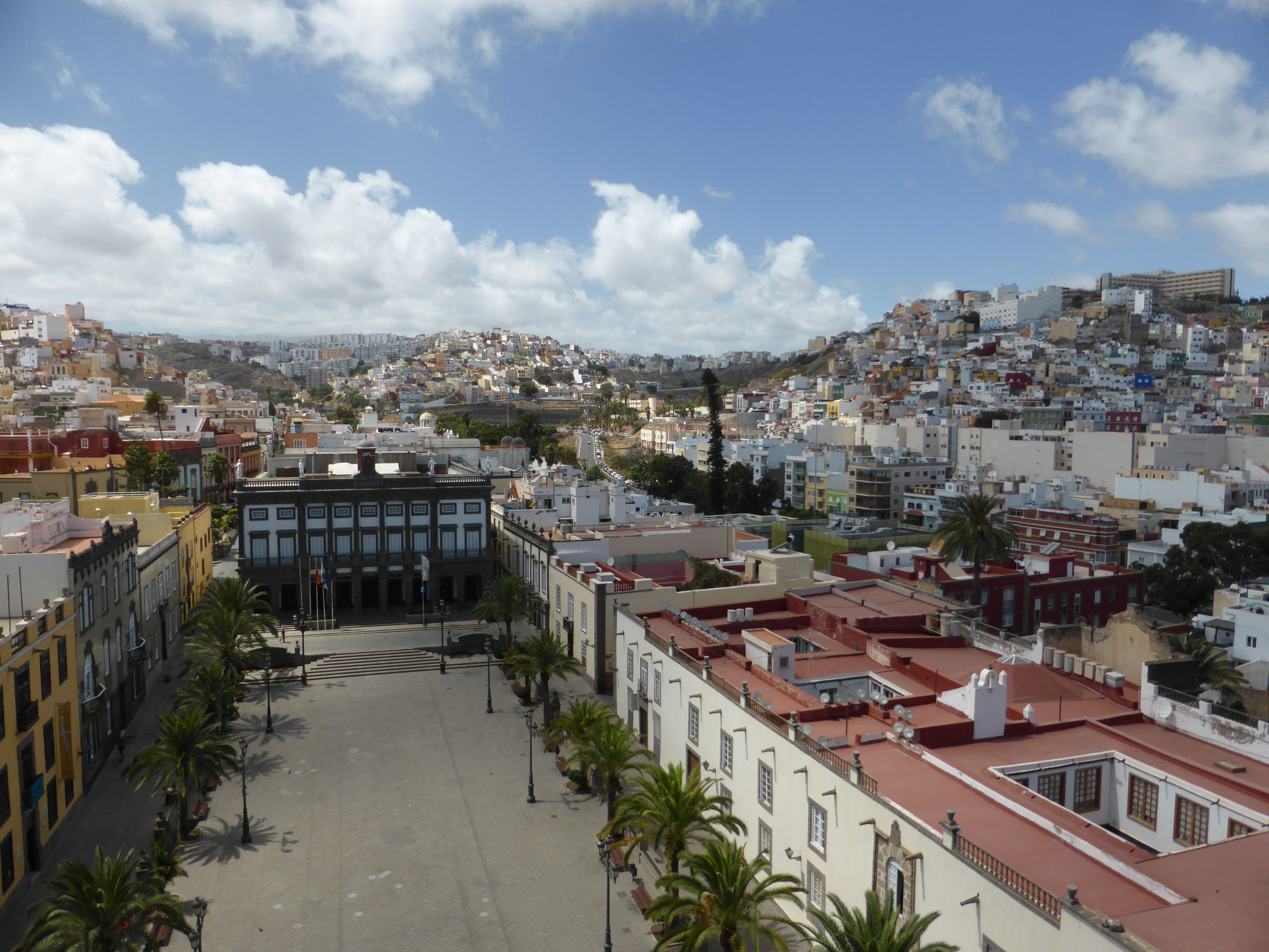 Vista tomada desde lo alto de la fachada principal de la Catedral de Santa Ana, en la ciudad de Las Palmas de Gran Canaria. Se ve la plaza de Santa Ana, donde se encuentra el Ayuntamiento (Casas Consistoriales ), en el barrio de Vegueta. A lo lejos, se levantan los riscos de San Roque y San Nicolás, suburbios históricos de la ciudad.